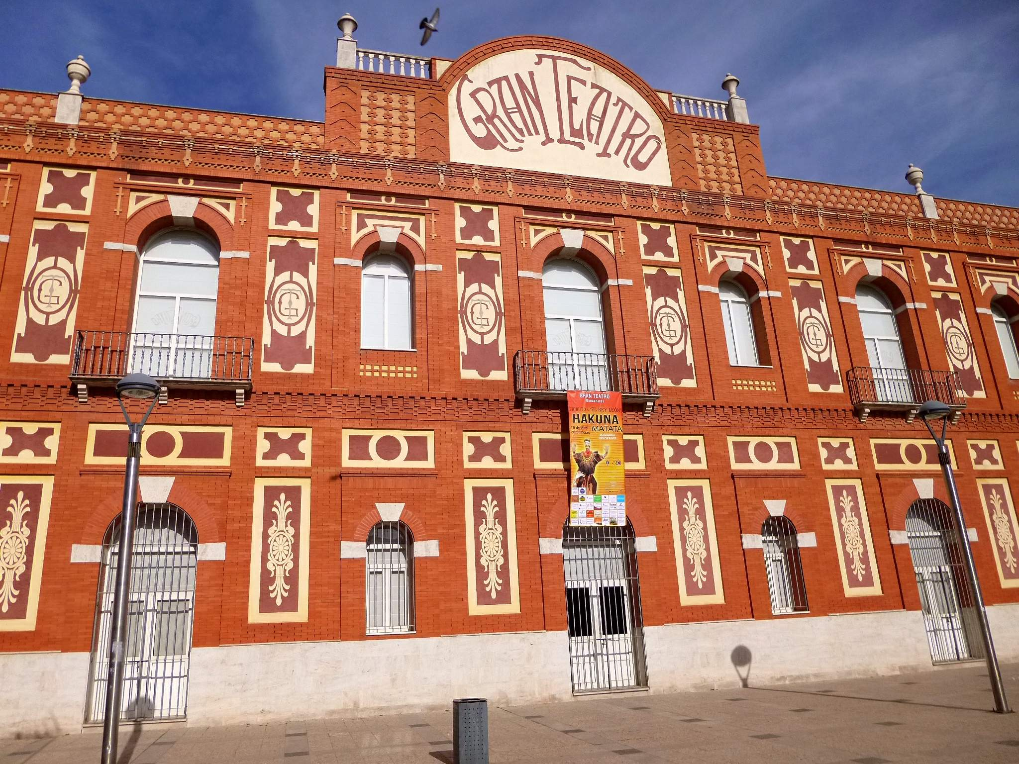 Gran Teatro de Manzanares